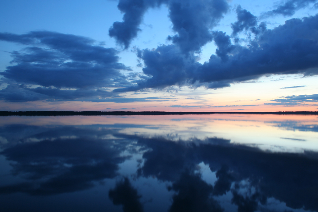 Rėkyvos ežeras, Šiauliai